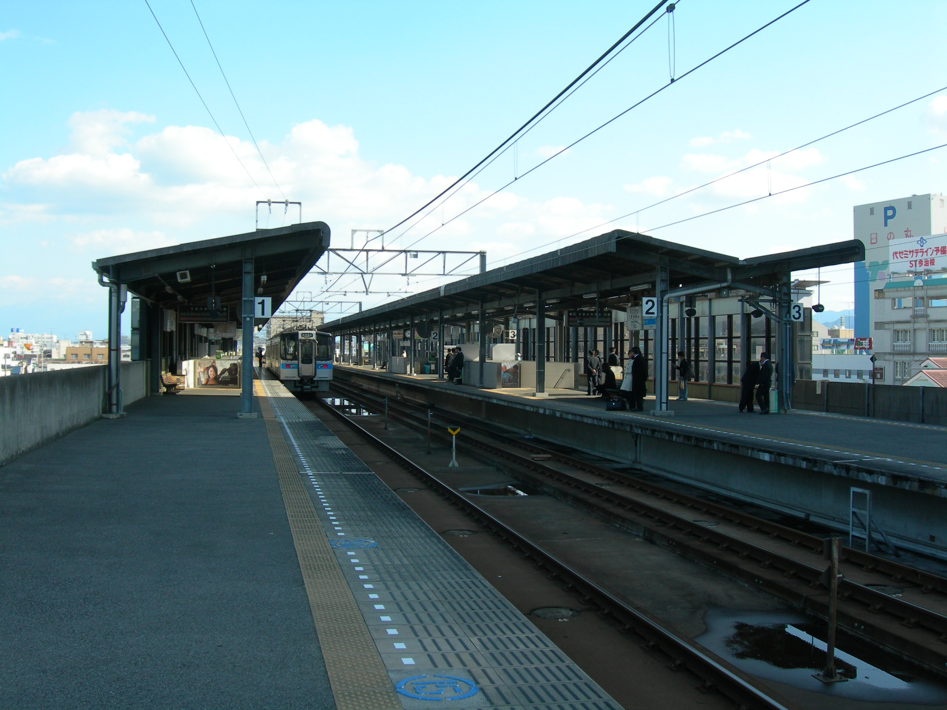 今治駅プラットホーム